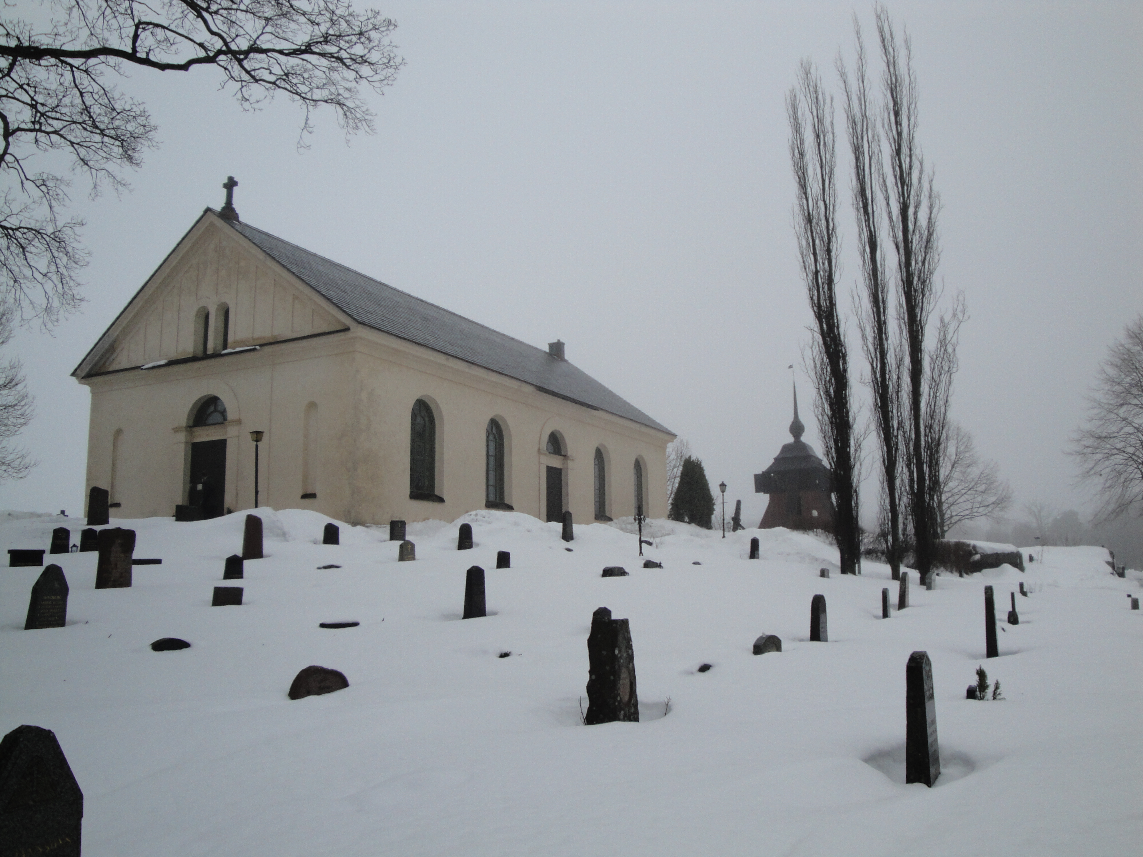 Blidö kyrka med klockstapeln samt ingångarna på södra och östra sidan.